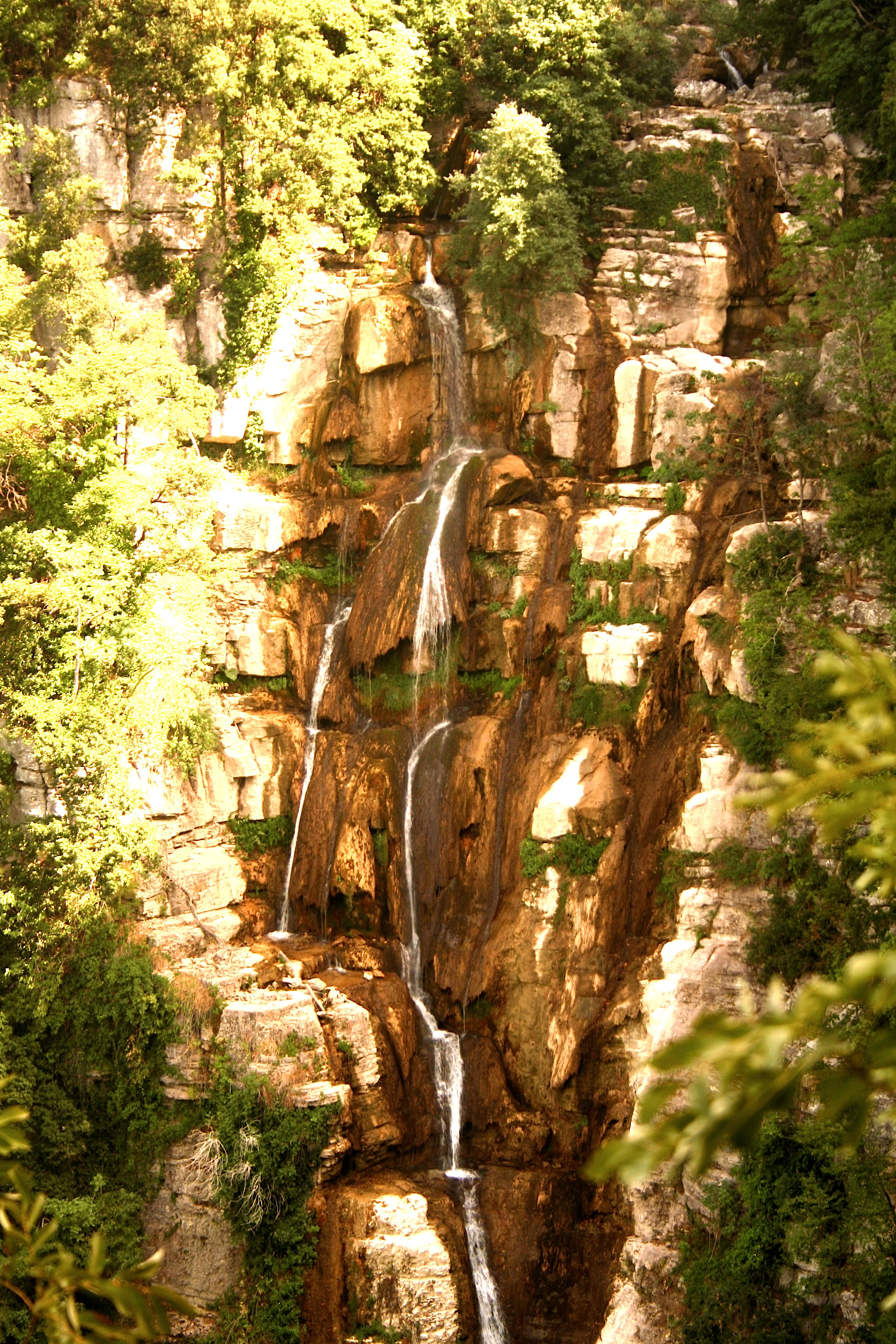 Cascate del Rio Verde This is a photo of a monument which is part of cultural heritage of Italy. The authorisation for taking photos of this object was provided by the World Wide Fund for Nature Italy.